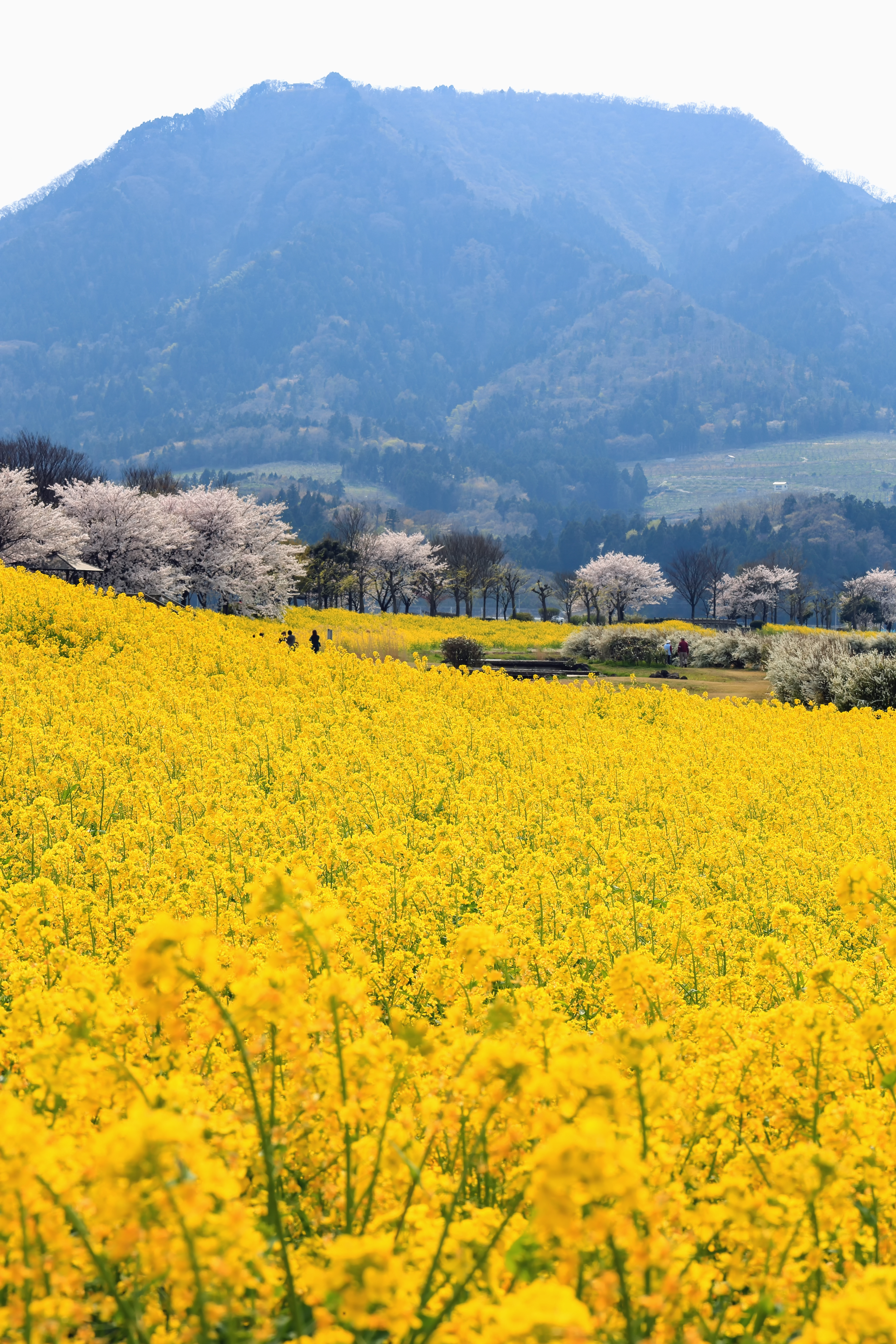 新潟市にある上堰潟公園の春の風景。菜の花と桜を眺めに人々が集う。背景に見えるのは角田山（標高481.7m）